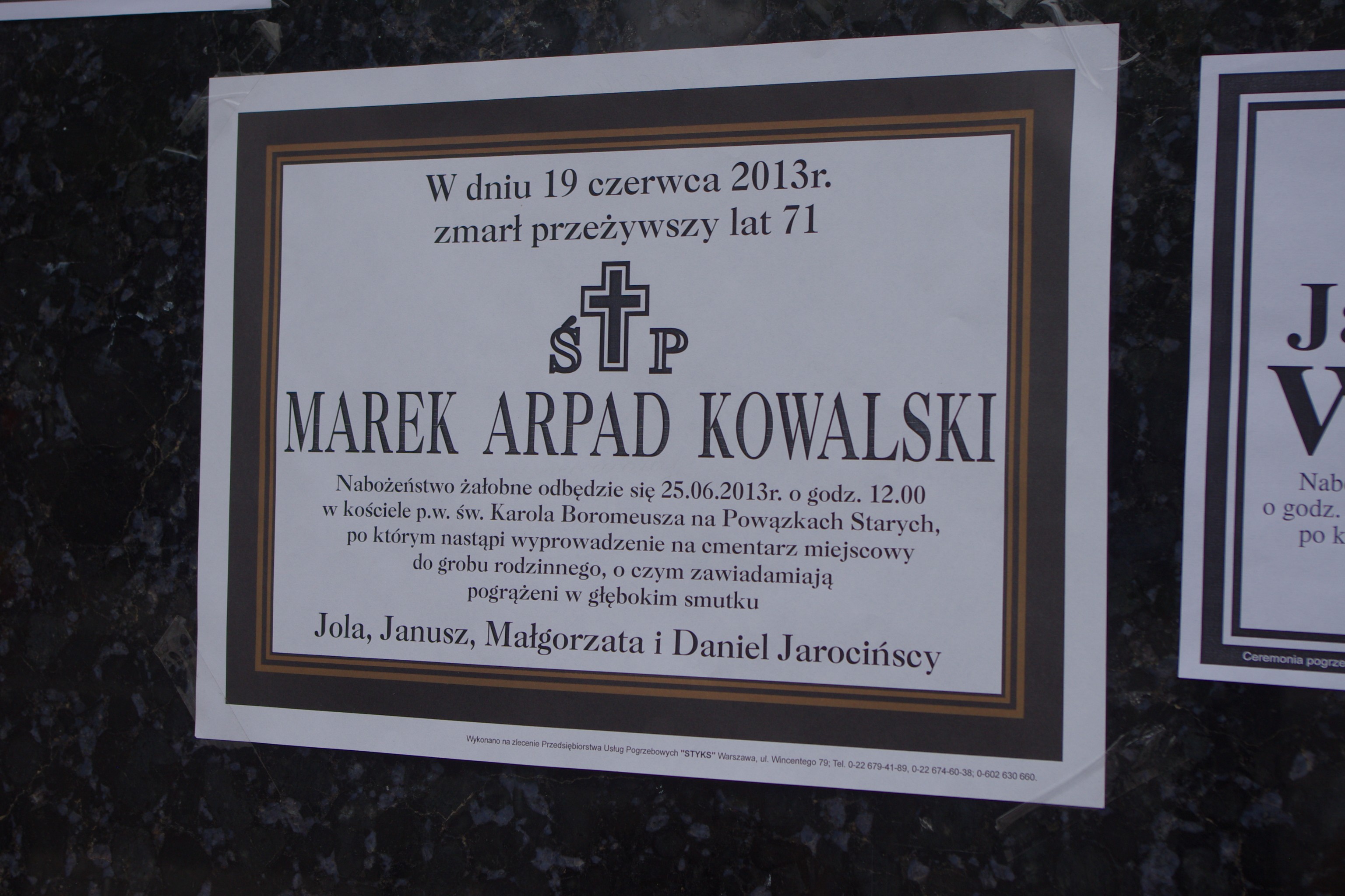 Nekrolog dziennikarza Marka Arpada Kowalskiego (1942-2013) przy wejściu do Kościoła p.w. św. Karola Boromeusza na warszawskich Powązkach